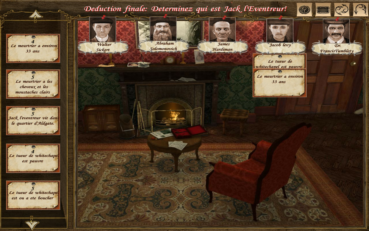 Capture d'écran du jeu Sherlock Holmes contre Jack l'Éventreur dans sa version bêta. Capture réalisée à la fin du jeu, au moment de déterminer qui est le meurtrier. De nombreuses choses ont été changées dans la version finale. Ici, le titre de l'énigme n'a aucun accent, aucune étiquette n'est ajoutée d'office à chacun des candidats, et lorsqu'on ajoute une nouvelle étiquette, elle ne devient ni verte (bien placée) ni rouge (mal placée), mais reste marron, ce qui rend l'énigme très difficile à résoudre. On remarquera aussi l'existence d'une étiquette sur laquelle est marquée "le meurtrier a environ 33 ans", qui a été supprimée dans la version finale.